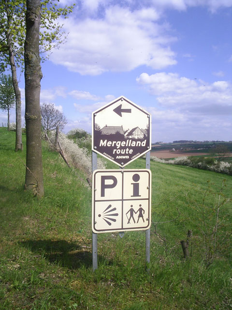 Mergellandroute (bruin), foto eigen werk